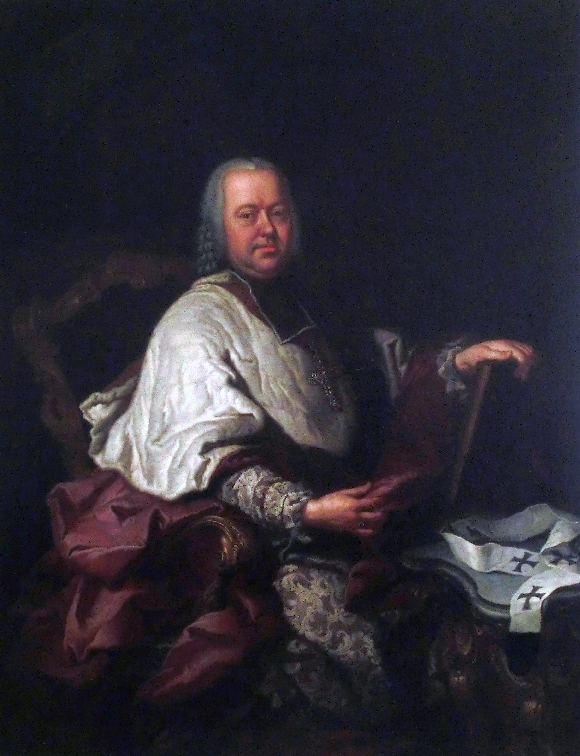 Antonín Petr Příchovský z Příchovic, kolem roku 1780